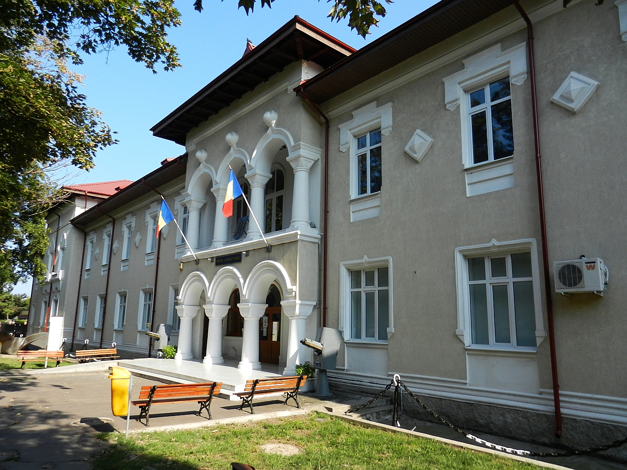 Muzeul Marinei Române, fosta Școala de Marină